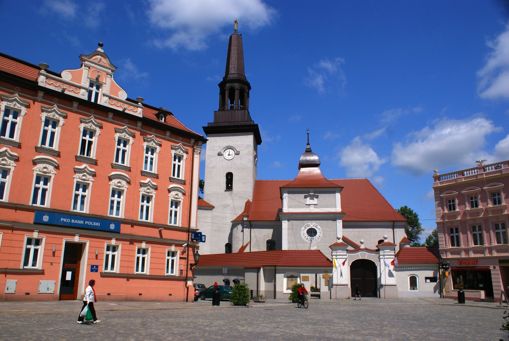 Kościół p. w. św. Marcina i dom nr Rynek 24 w Jarocinie